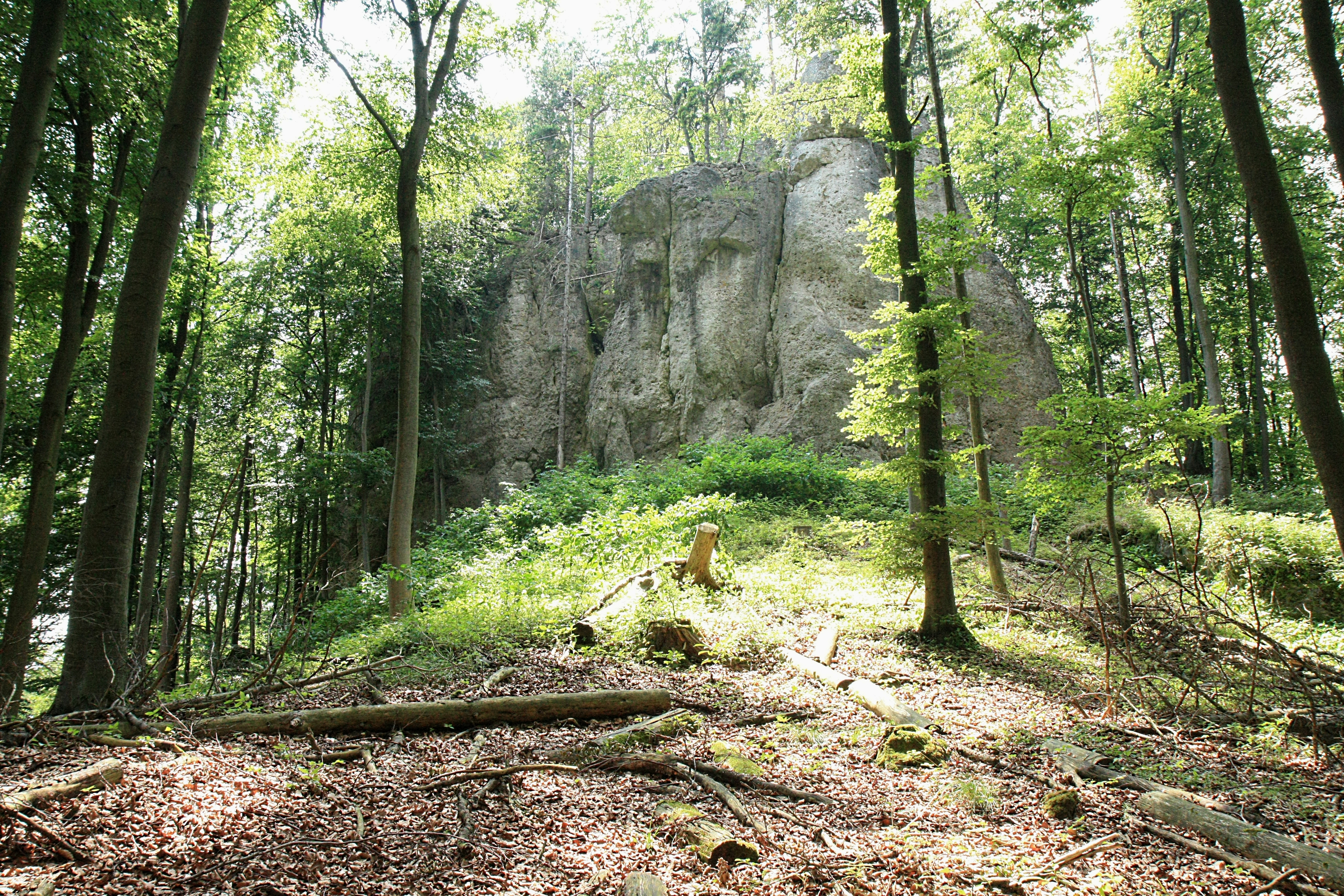 Ansicht des Burgfelsens, auf dem die Oberburg Riegelstein lag